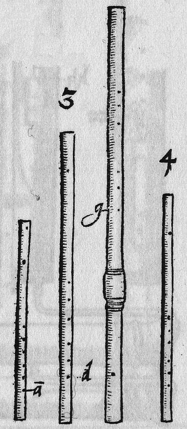 Syntagma Musicum Theatrum Instrumentorum seu Sciagraphia Wolfenbüttel 1620